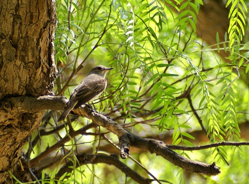 Muchołówka szara w hiszpańskim lesie.